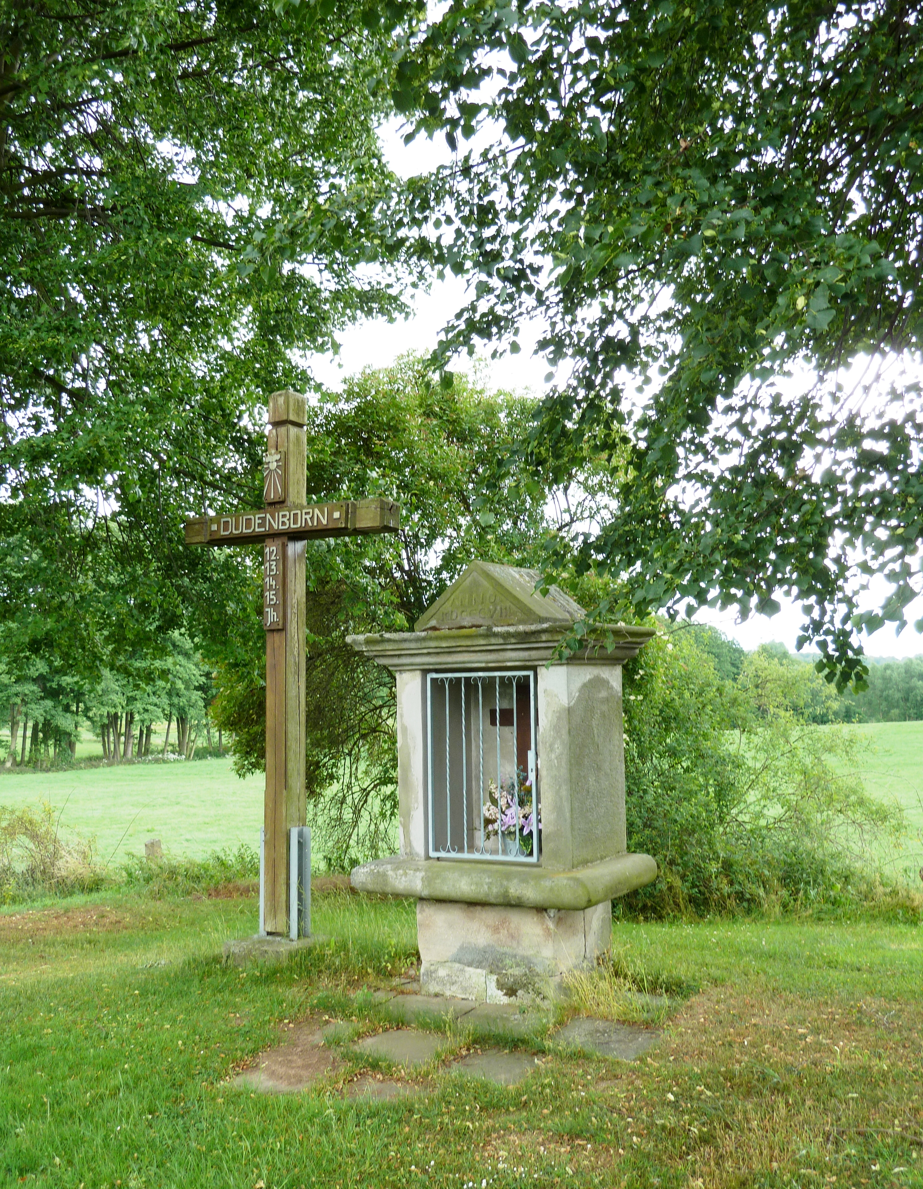 Dorfstelle der Ortswüstung Dudenborn bei Nesselröden, Stadt Duderstadt, Eichsfeld. Bildstock aus dem Jahr 1808